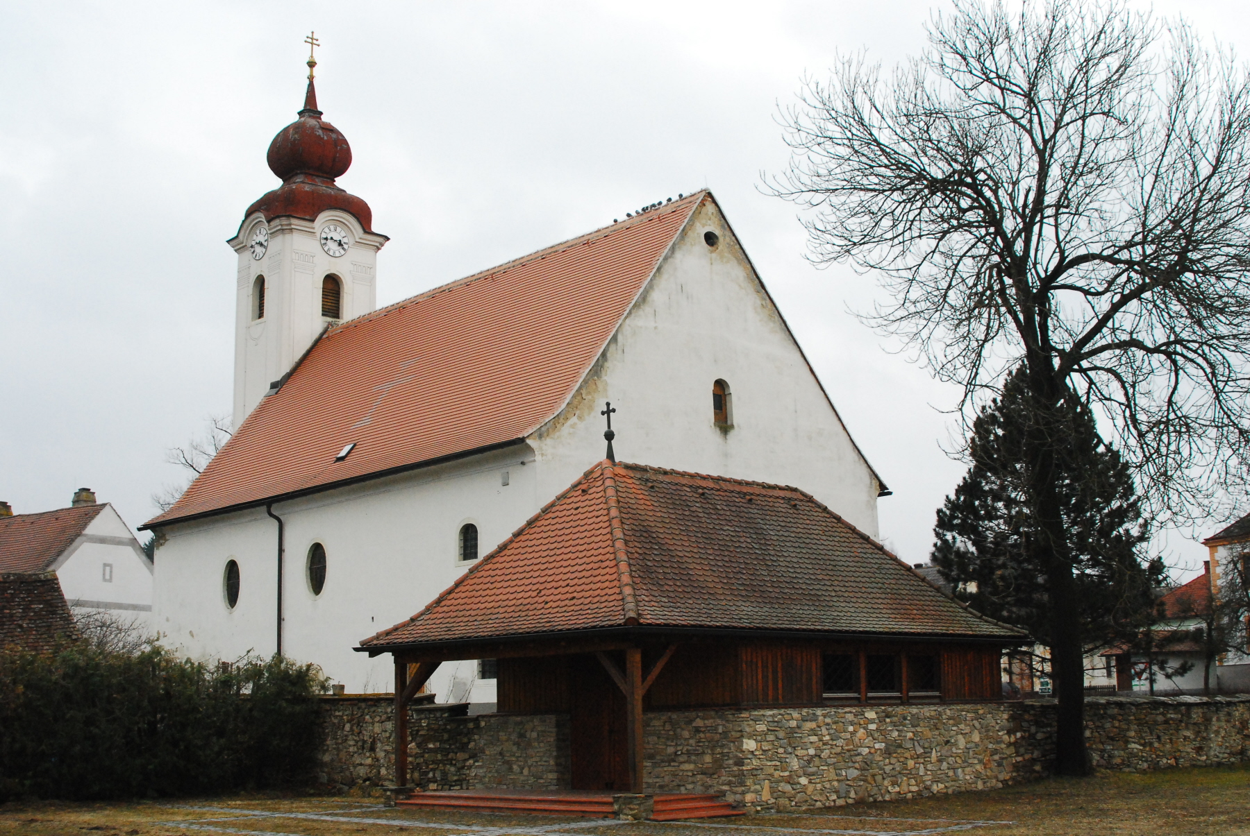 Kirche von Franzen in Niederösterreich